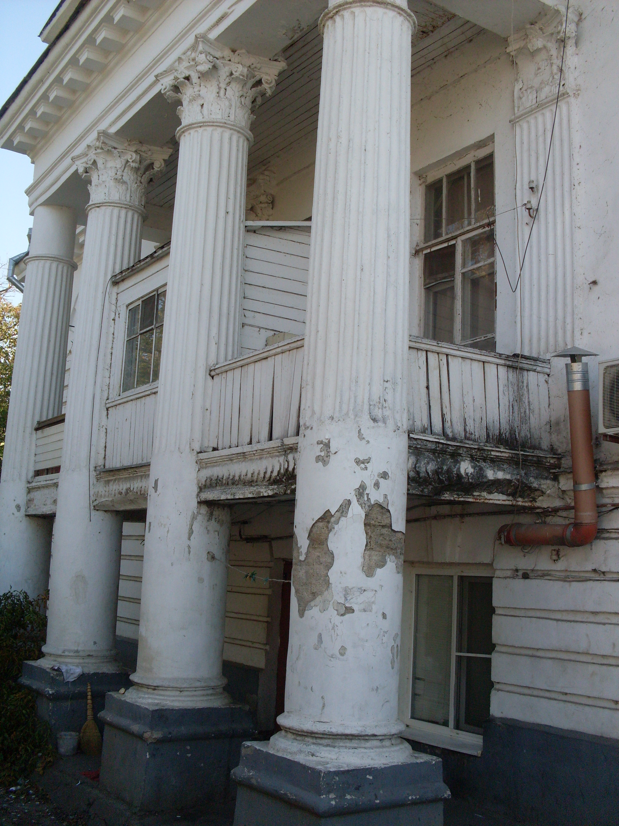 Жилой дом купца Кирсанова. комплекс застройки улицы. (Ростовская область, Таганрог, Чехова улица, 129)